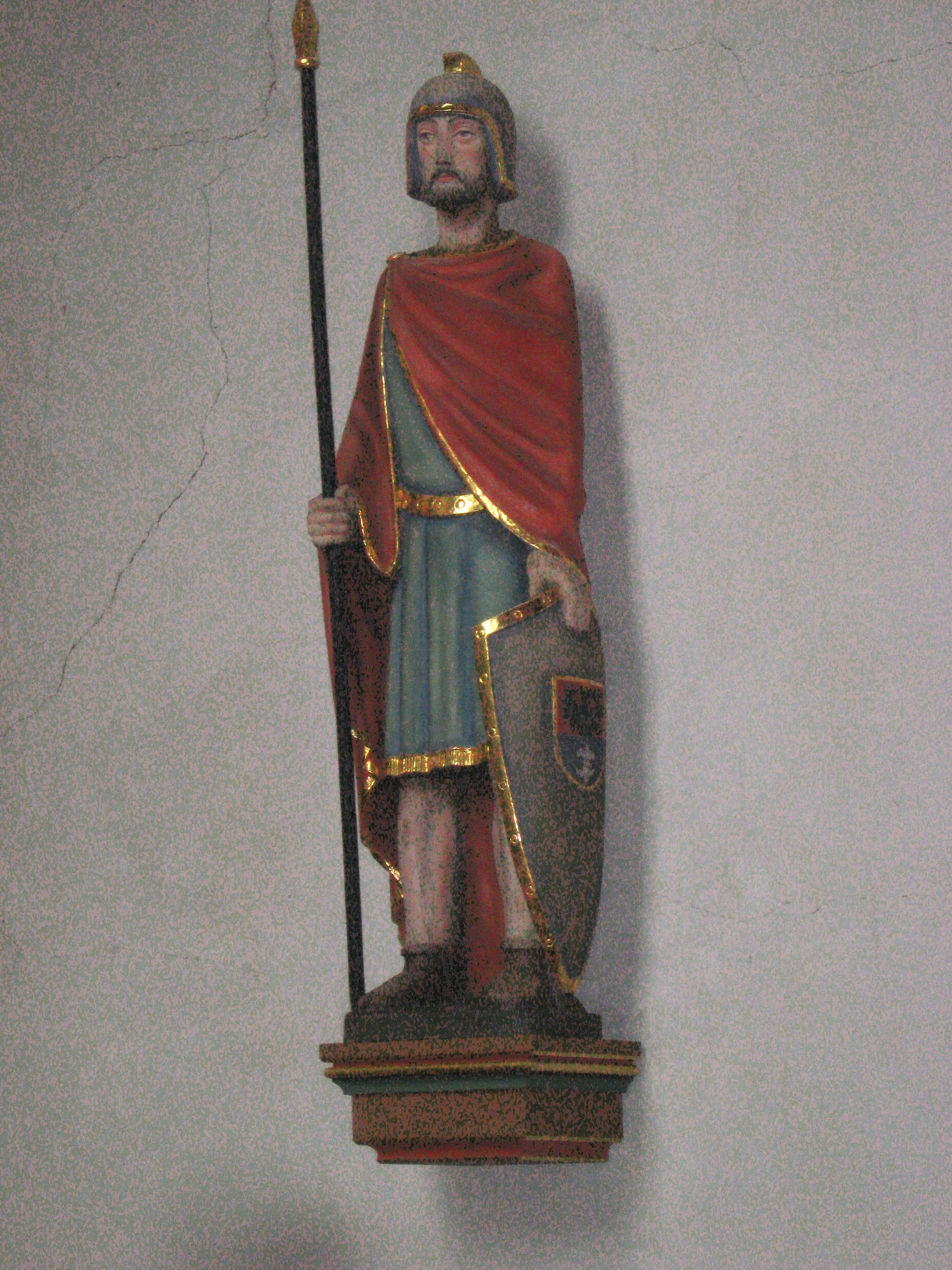 Statue des heiligen Quirinus in der Kirche in Bengel